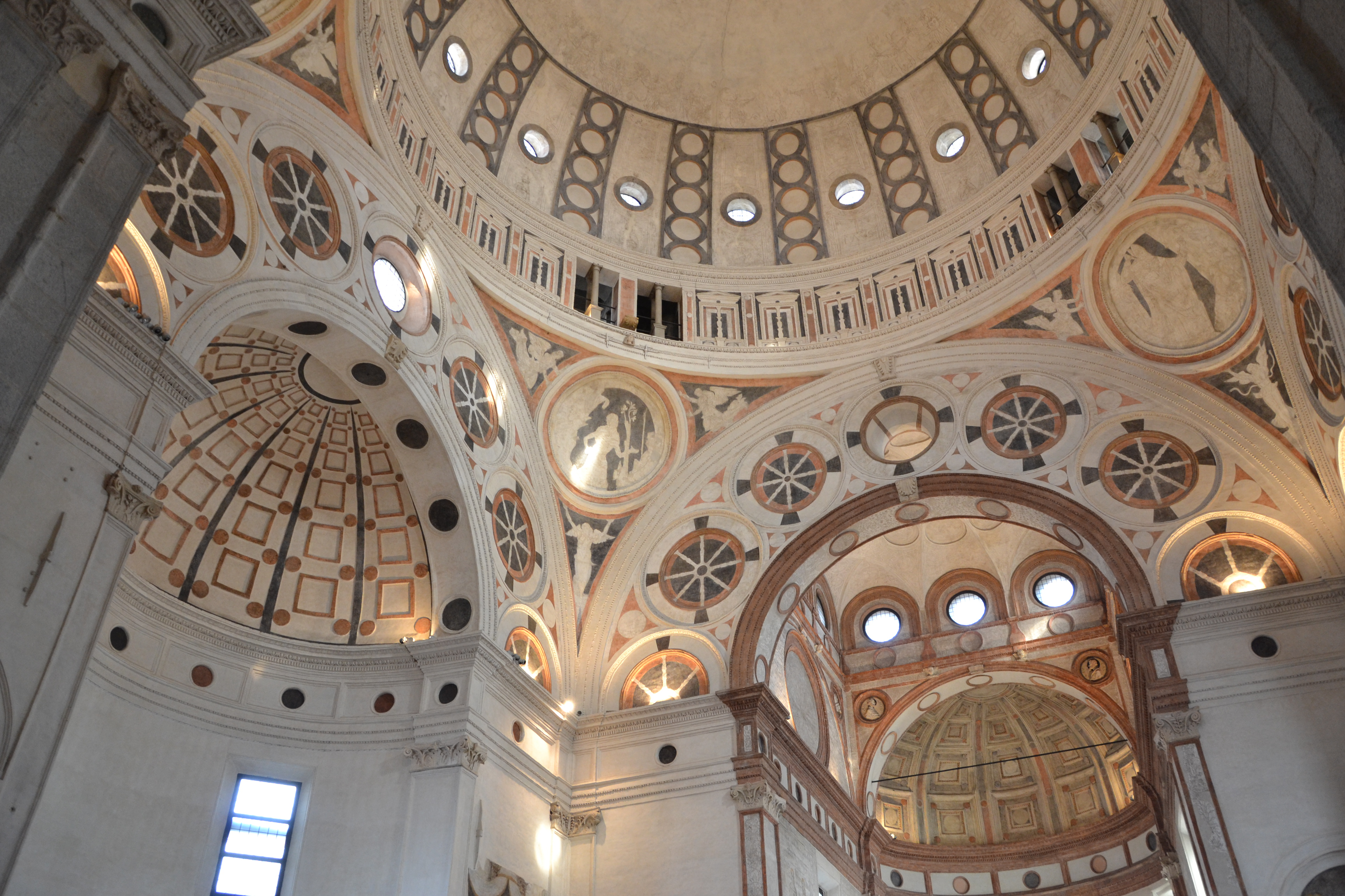 interno della Tribuna Bramantesca, Santa Maria delle Grazie (Milan)